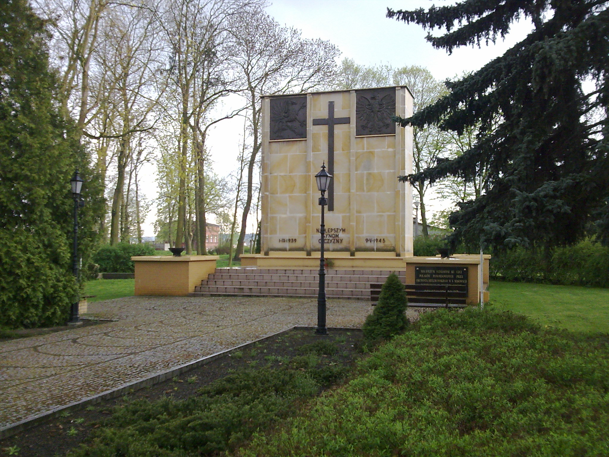 Pomnik - Mauzoleum ku czci osób zamordowanych w Rudzkim Moście